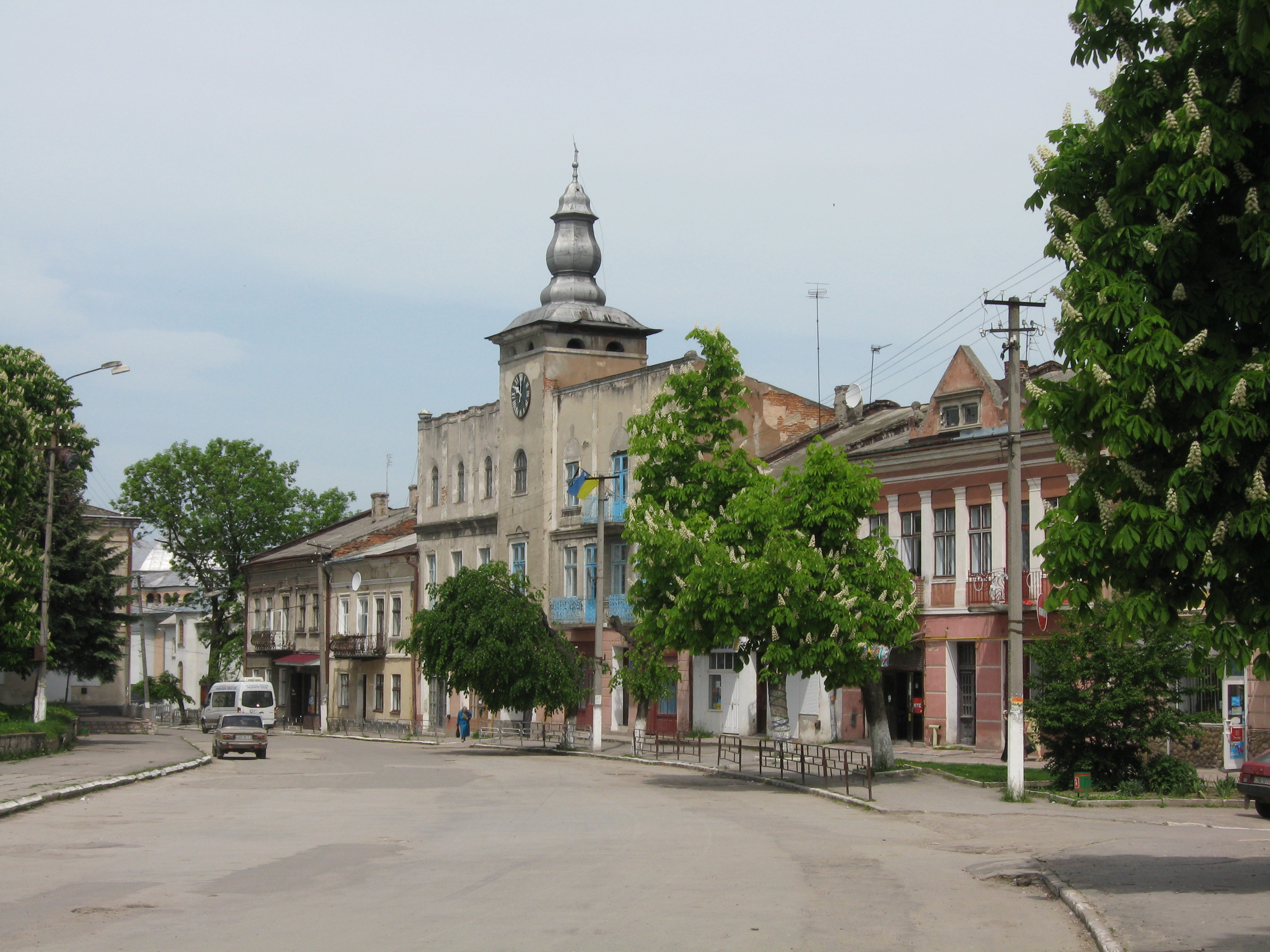 Fragment rynku w Podhajcach z widoczną na końcu drogi cerkwią prawosławną i Ratuszem po prawej